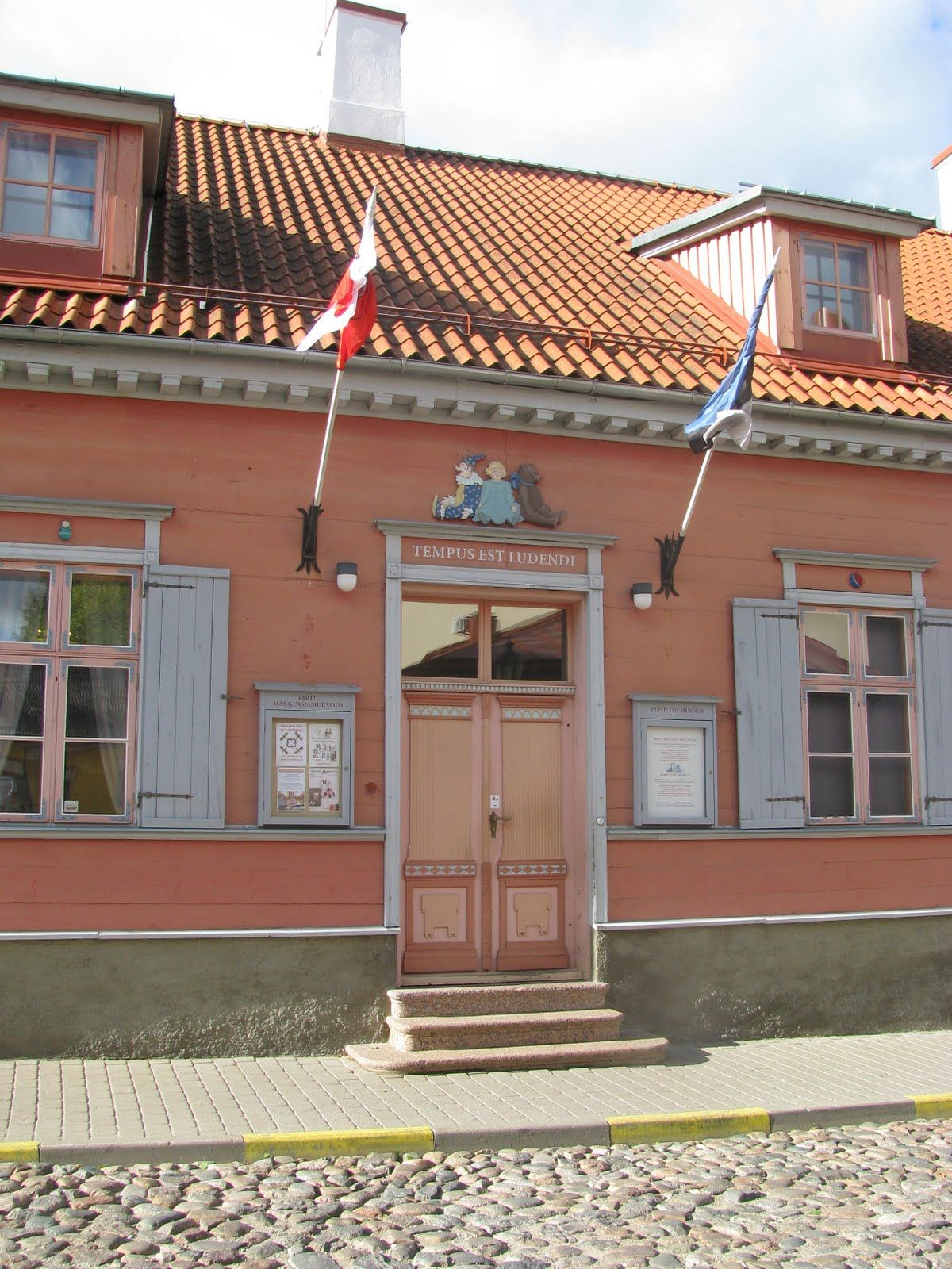 Tartu mänguasjamuuseumi peasissepääs Lutsu tänav 8, 19. sajand